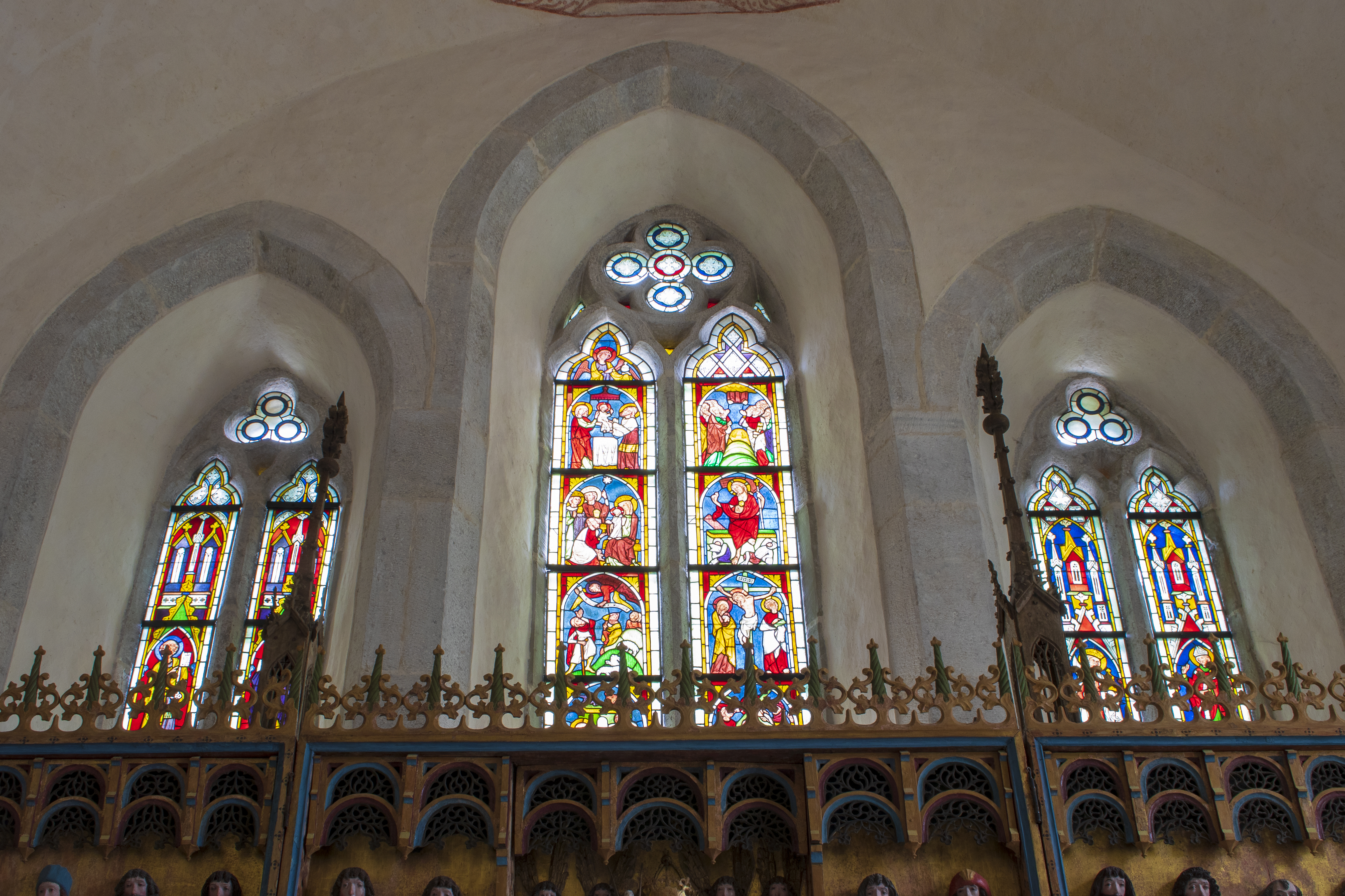 Vidreiras da igrexa de Lye, na illa sueca de Gotland.